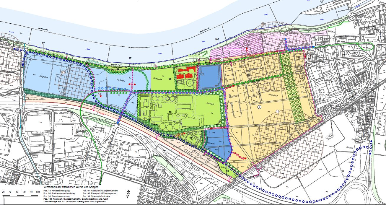 Zonenplan Salina Raurica, Pratteln Richtung Nord